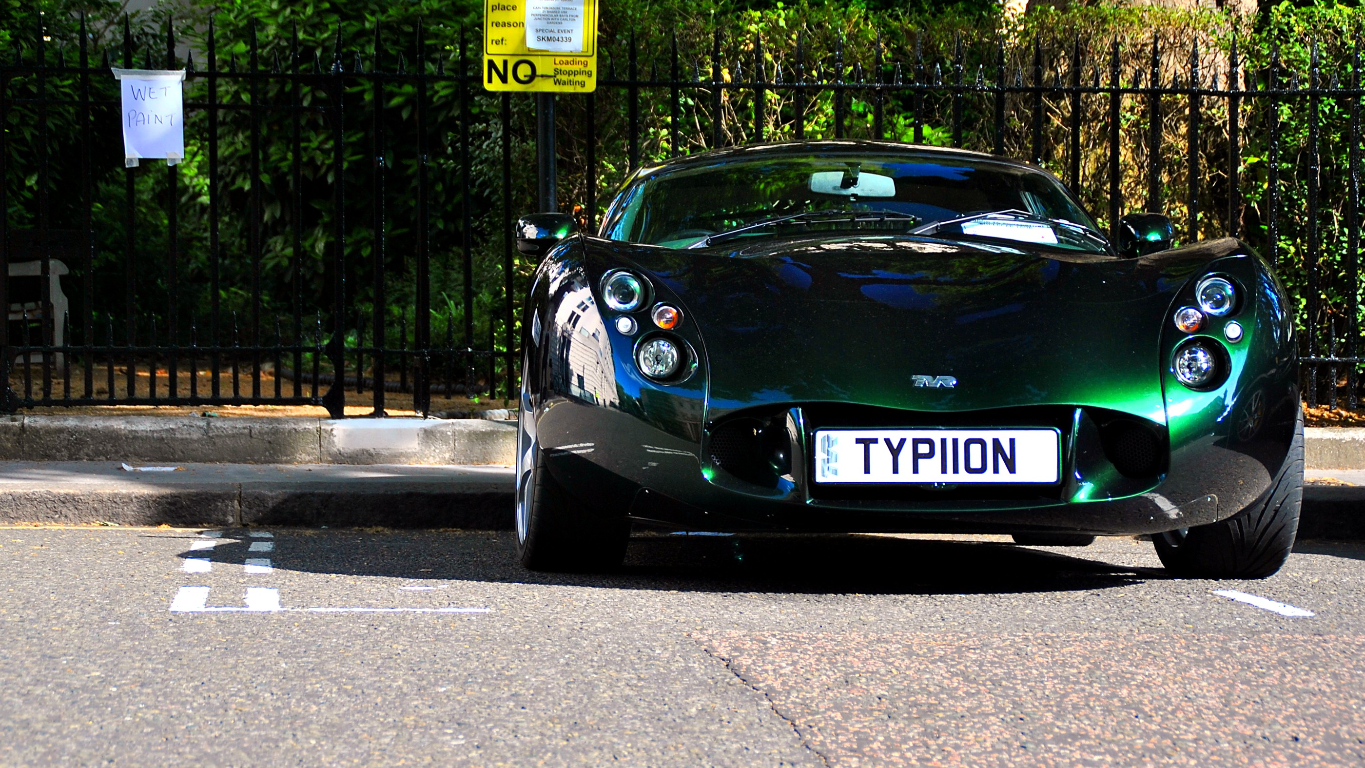 TVR Typhon